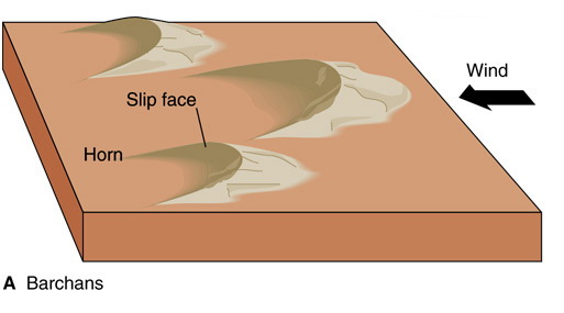 ภาพ 3 Barchan